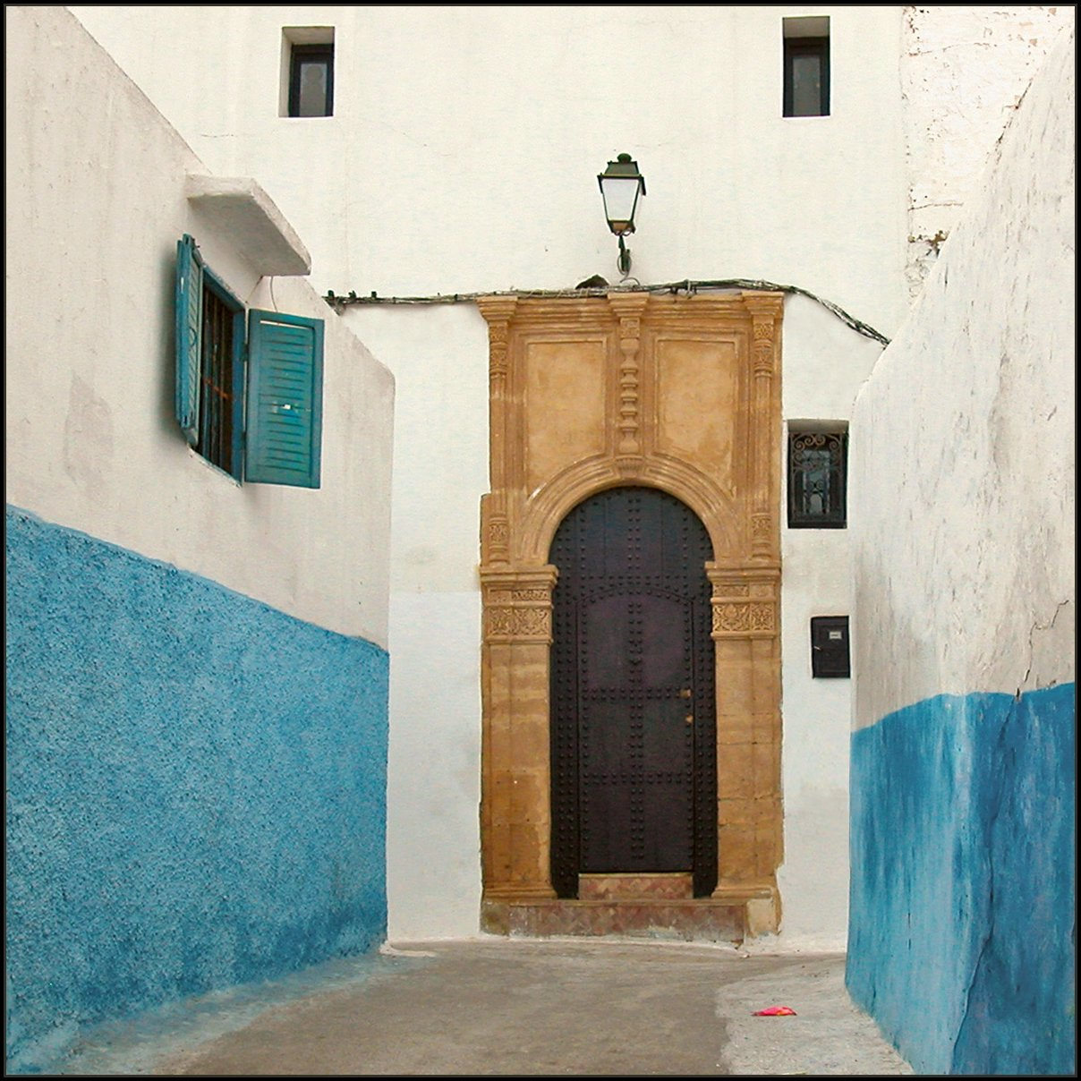 La casbah des Oudayas Rabat